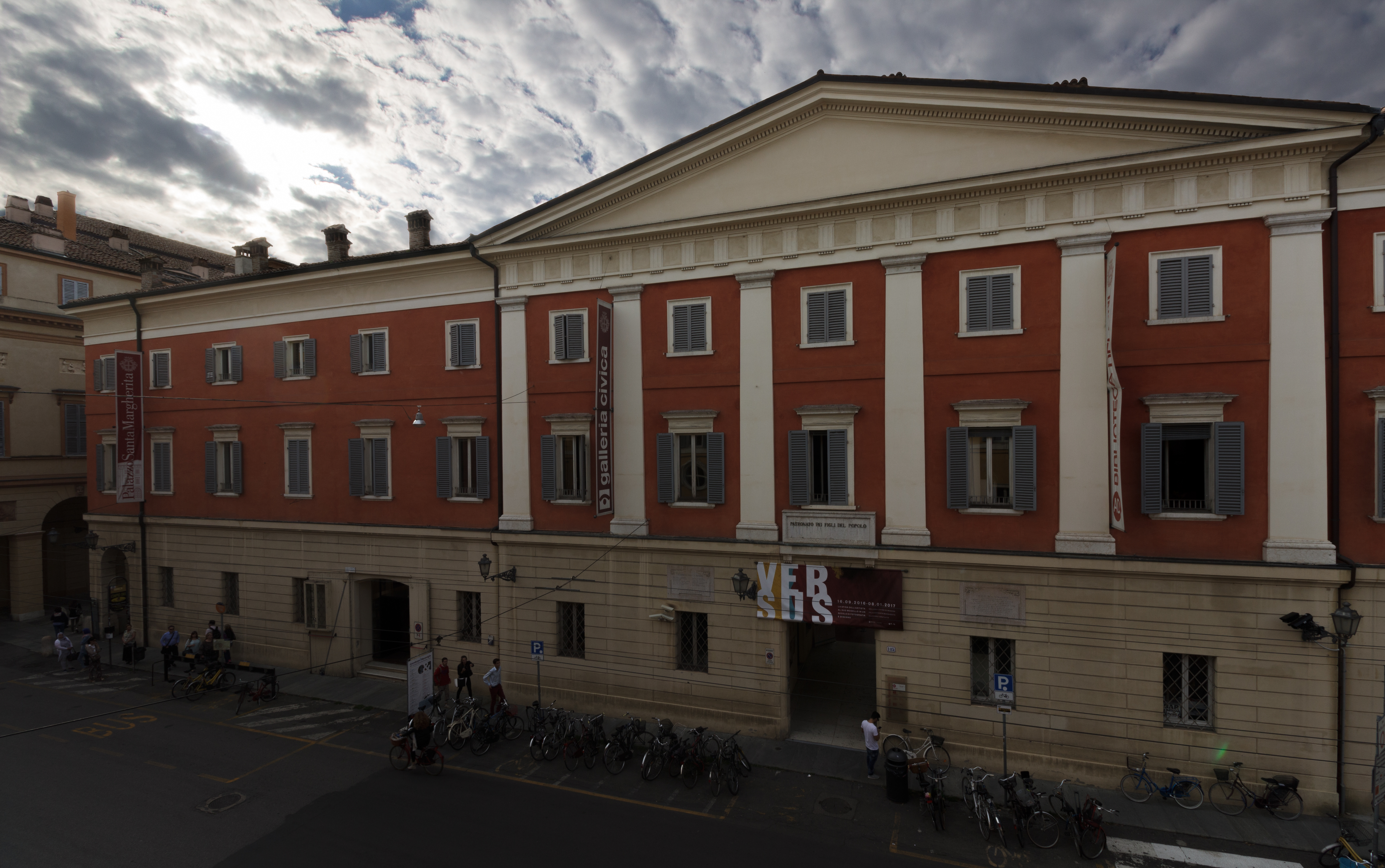 Palazzo Santa Margherita, Corso Canal Grande, Modena This is a photo of a monument which is part of cultural heritage of Italy.